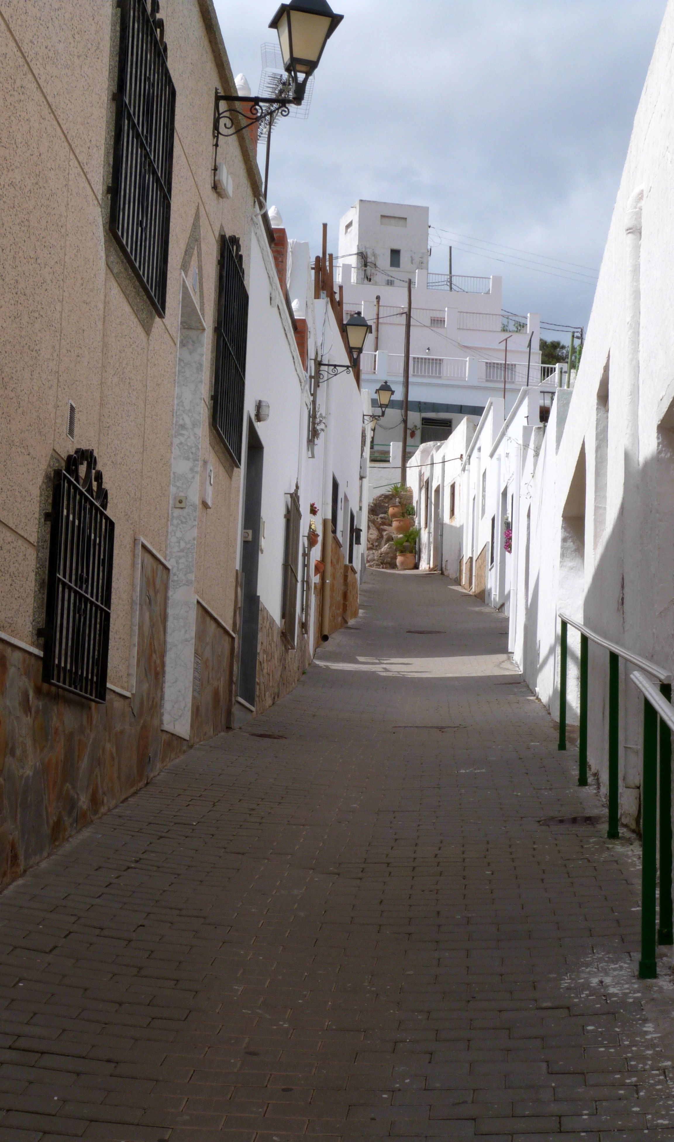 Straße in Enix